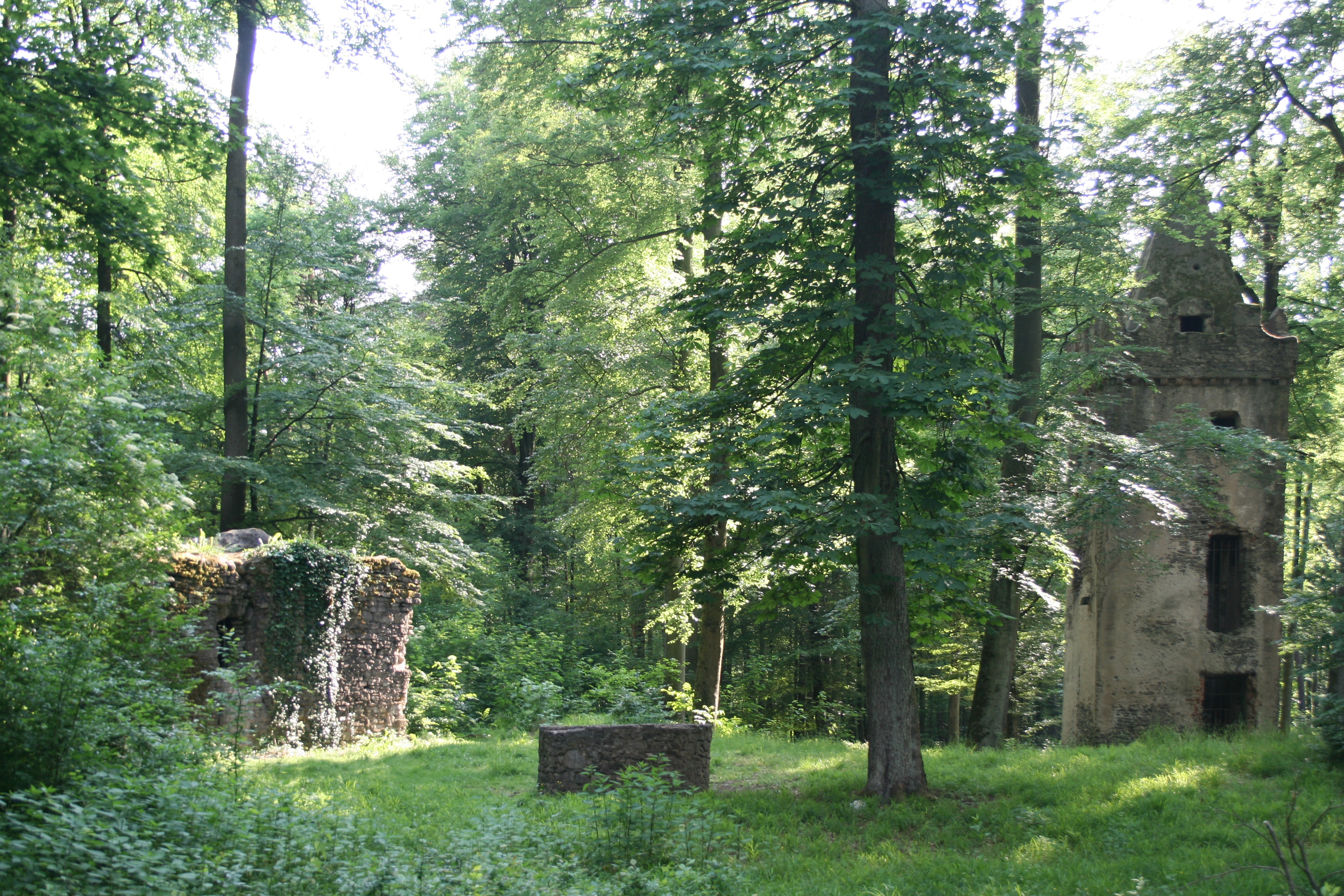 Klosterruine St. Wolfgang bei Hanau, Ansicht von Nordosten 2012, Anlage wurde kürzlich von Bewuchs befreit.